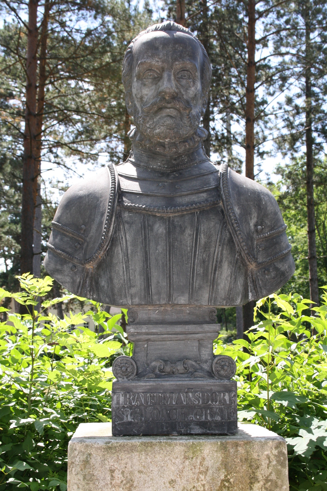 Büste in der Gedenkstätte Heldenberg (Niederösterreich)